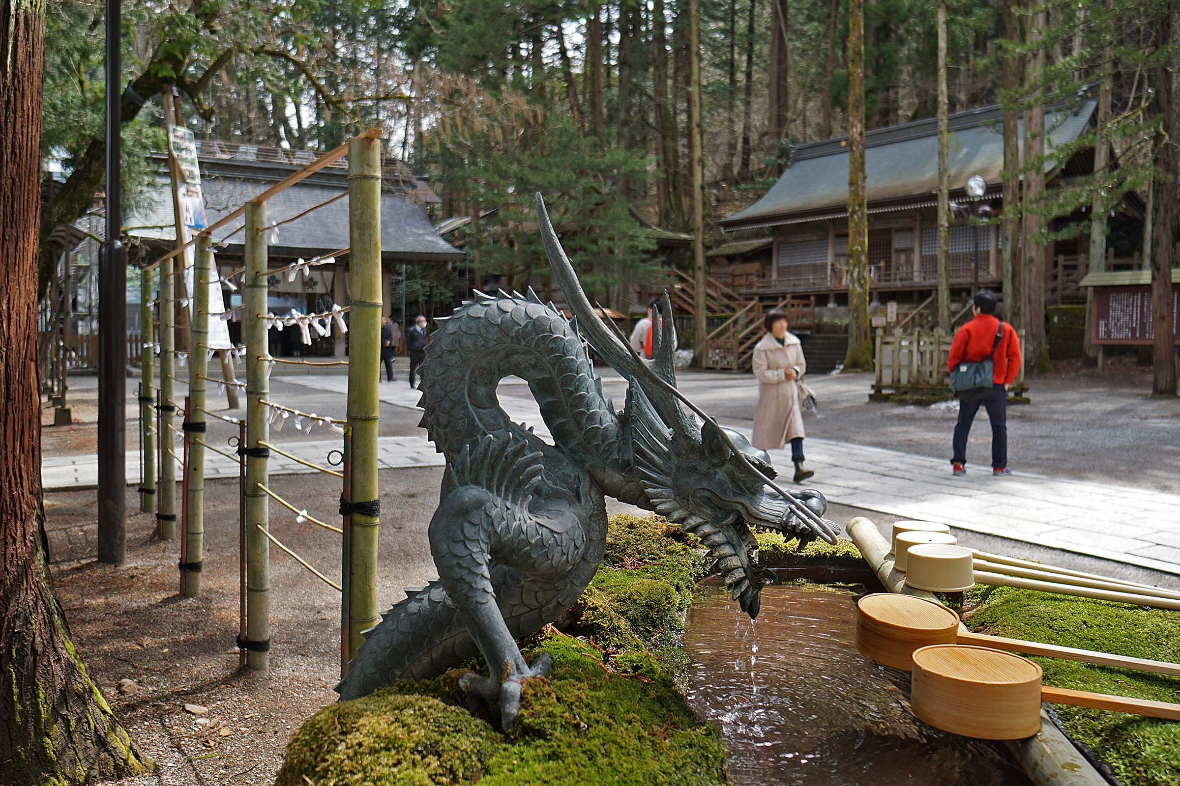 Suwa taisha Kamisha Honmiya , 諏訪大社 上社 本宮